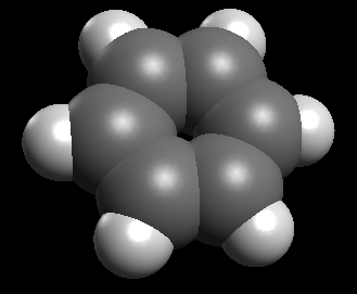 Es handelt sich um eine Darstellung eines Kohlenwasserstoffs in einer einfachen Kugelmodelldarstellung, die eine leichte Erweiterung des Teilchenmodells ist. Dieses Bild ist dafür gedacht, Chemie-Anfänger zu verdeutlichen, dass sich die unterschiedlichen Kohlenwasserstoffe durch die unterschiedliche Verknüpfung von Kohlenstoff- und Wasserstoff-Atomen unterscheiden. Ist is a simple model vor chemistry-beginners to show how the different carbohydrogens differ in the combination of the Carbon- and Hydrogen-Atoms.